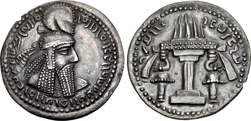 Dracma de Ardashir I cunhado ca. 233-239